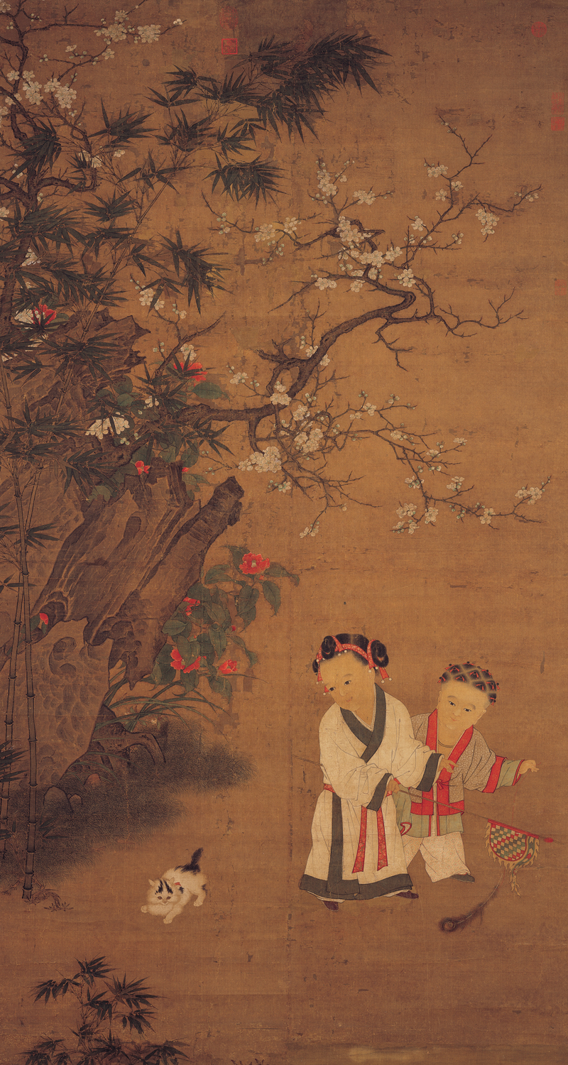 冬日嬰戲圖 Children playing on a winter day